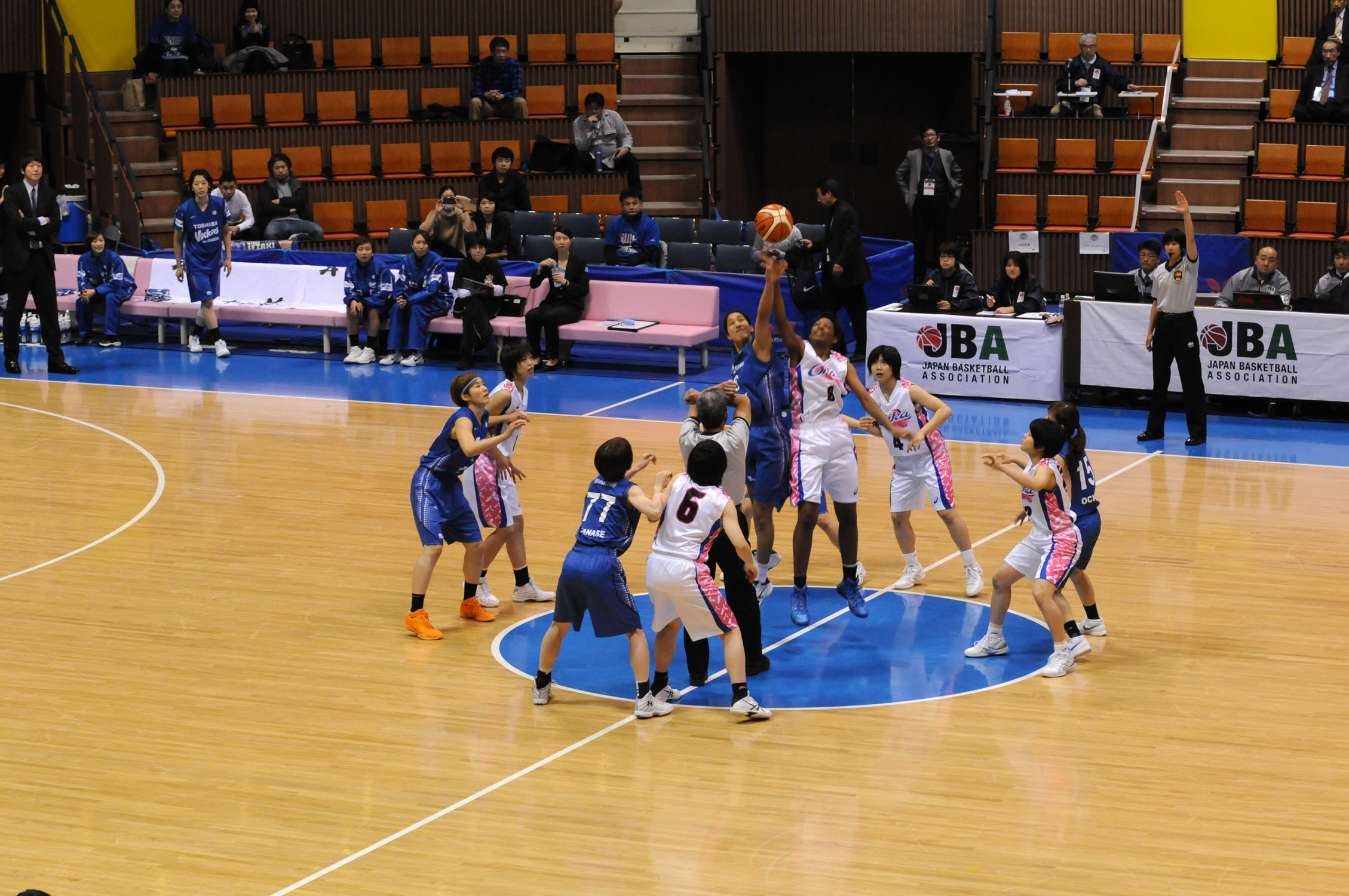 2016年全日本総合バスケットボール選手権大会二回戦、桜花学園対羽田ヴィッキーズ。代々木第二体育館で。